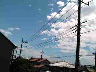 blocknoise sample.